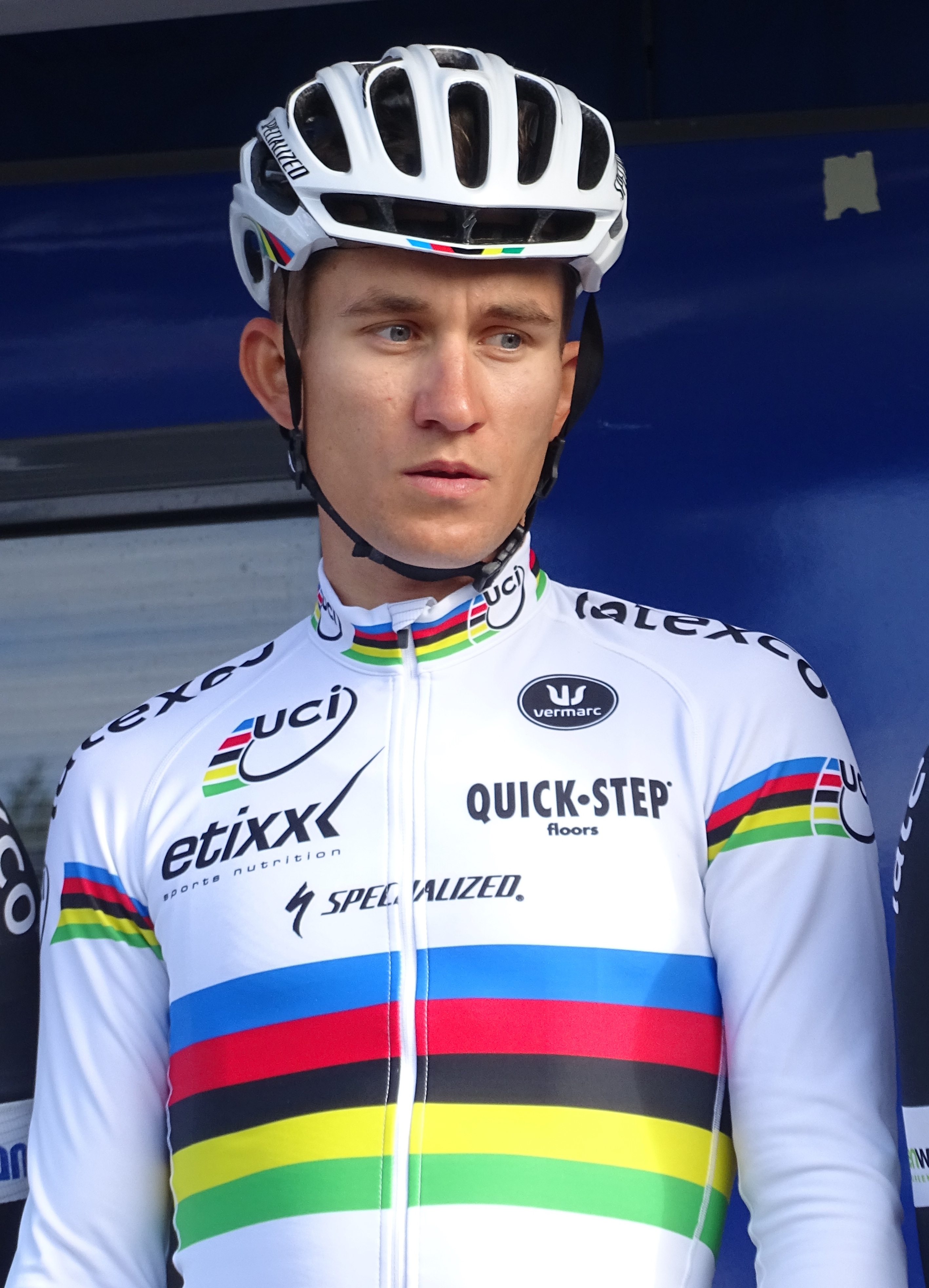 Reportage réalisé le dimanche 6 septembre à l'occasion du départ et de l'arrivée du Grand Prix de Fourmies 2015 à Fourmies, Nord-Pas-de-Calais, France.